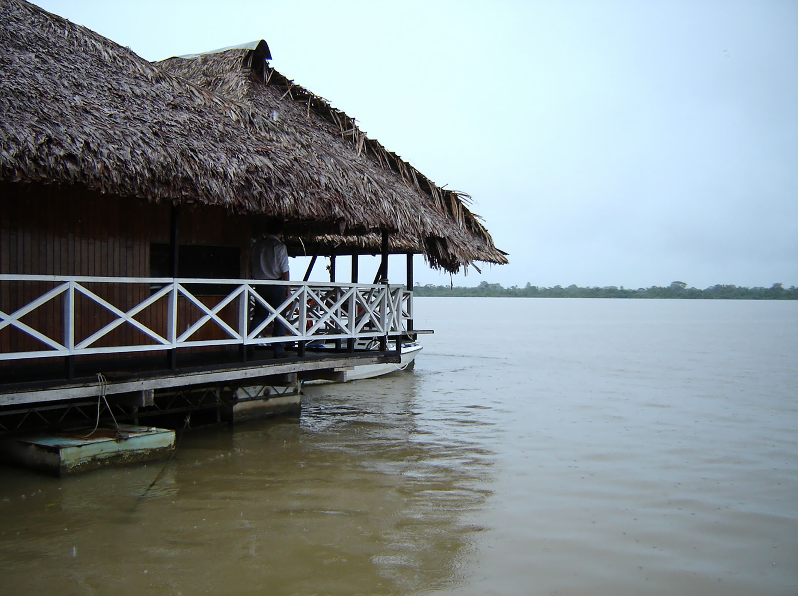 Vista de la maloca desde el lago de Yarinacocha.